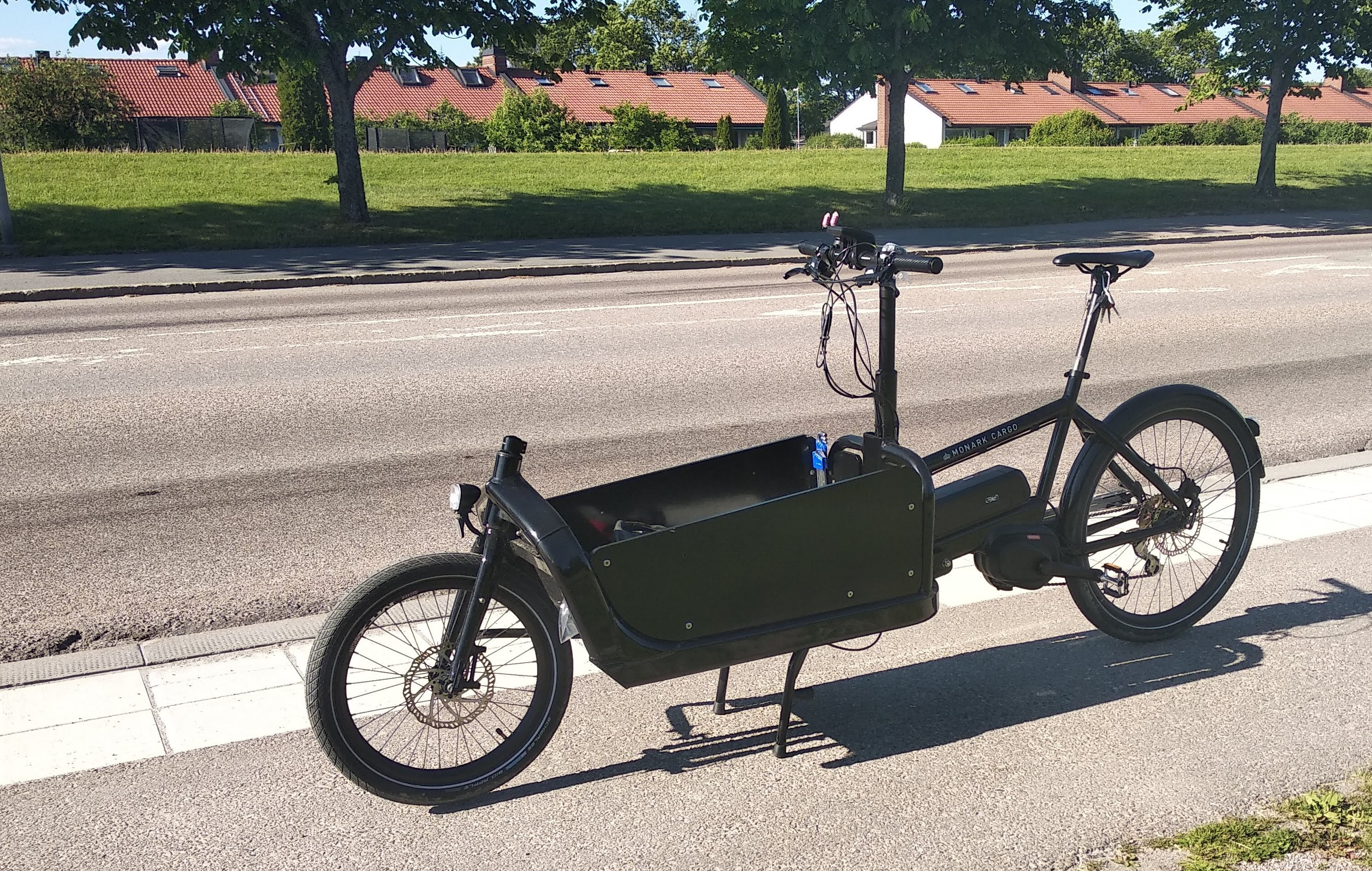 Lastcykeln Monark Cargo Load 2.0 (2019)